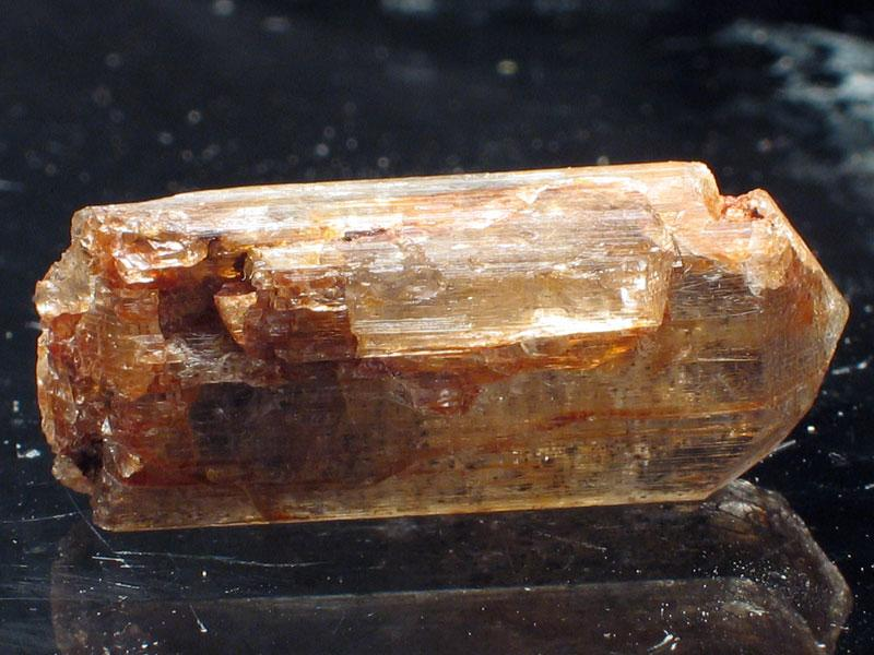 skapolit, pochodzenie Madagaskar, autor zdjęcia Stowarzyszenie Spirifer